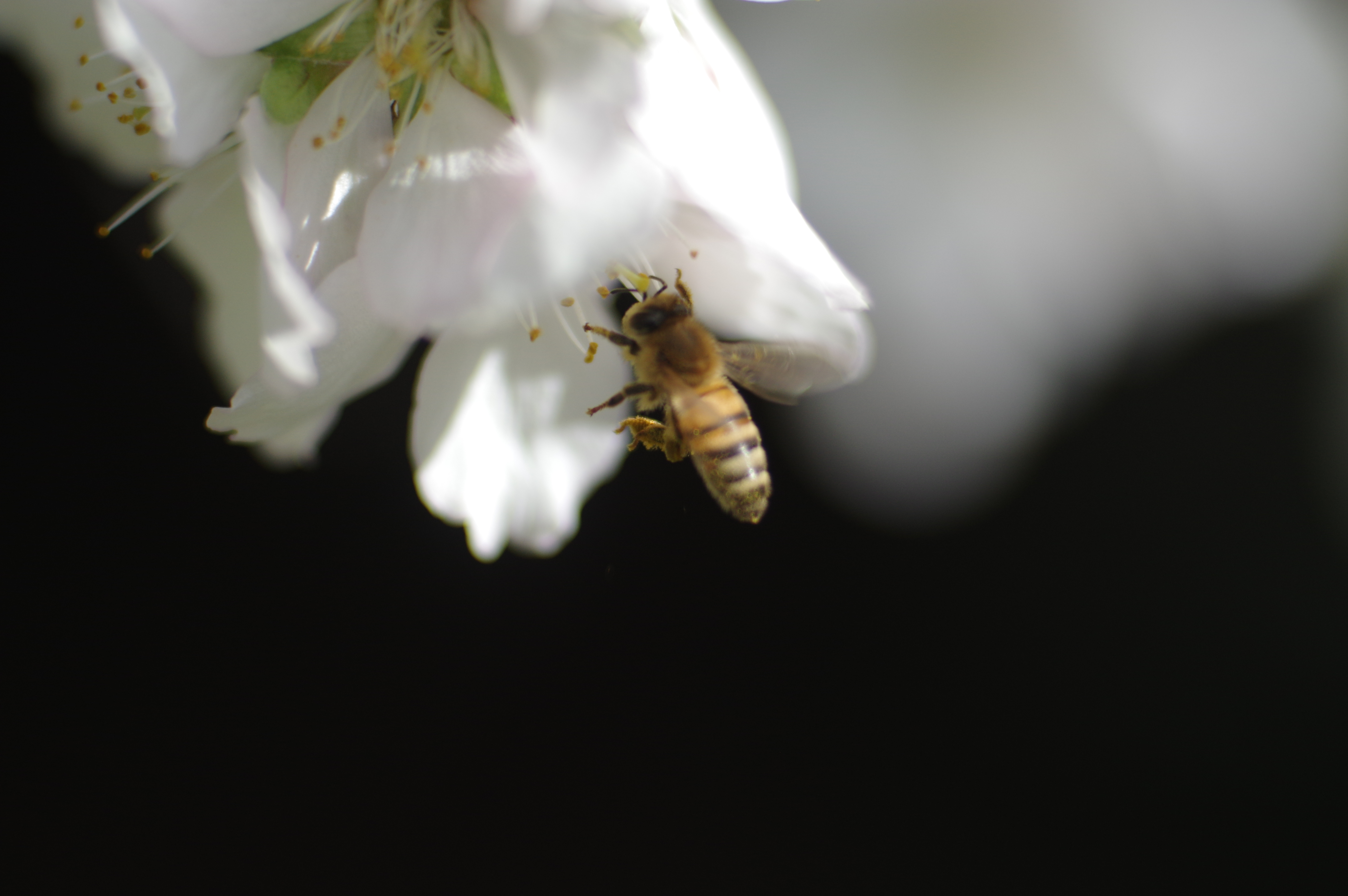 דבורת דבש לופתת אבקן פרח שקדיה בעזרת שני טפרים ברגלה ומקלפת אבקה